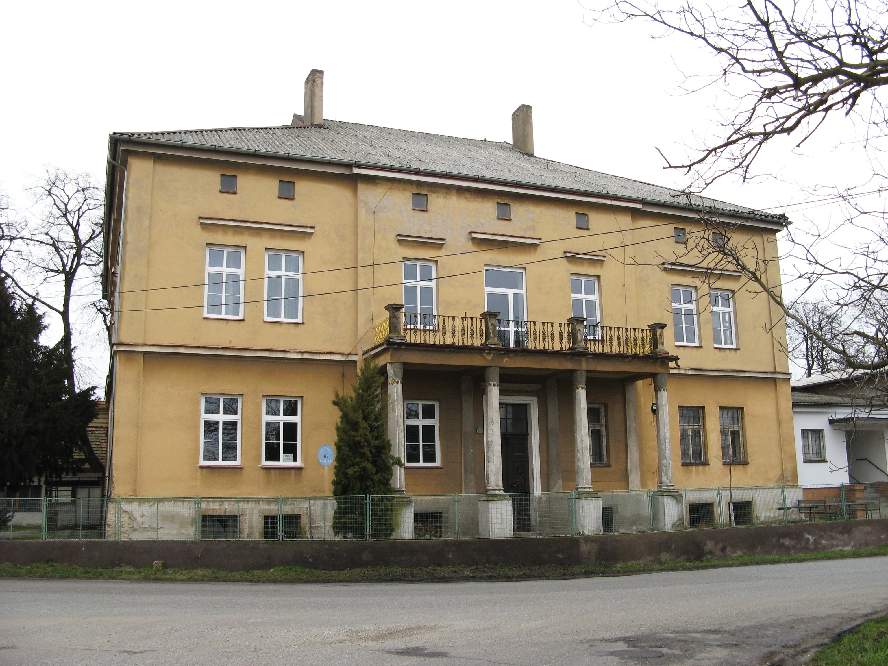 Milčice - obecní úřad